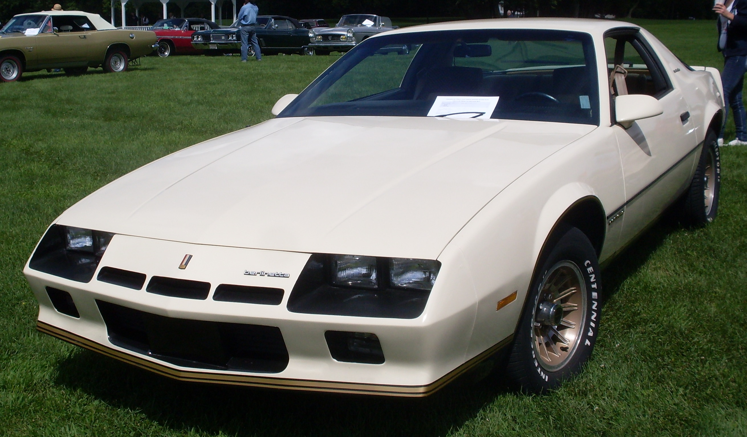 1984 Chevrolet Camaro photographed in Baie-D'Urfé, Quebec, Canada at Auto classique VAQ Baie-D'Urfé.